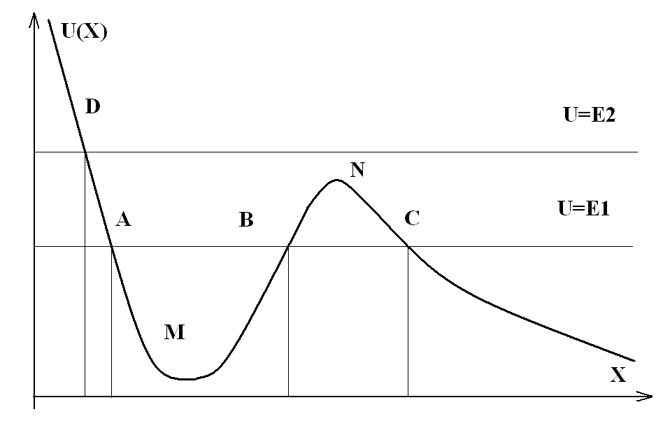 График потенциальной энергии (классический пример)